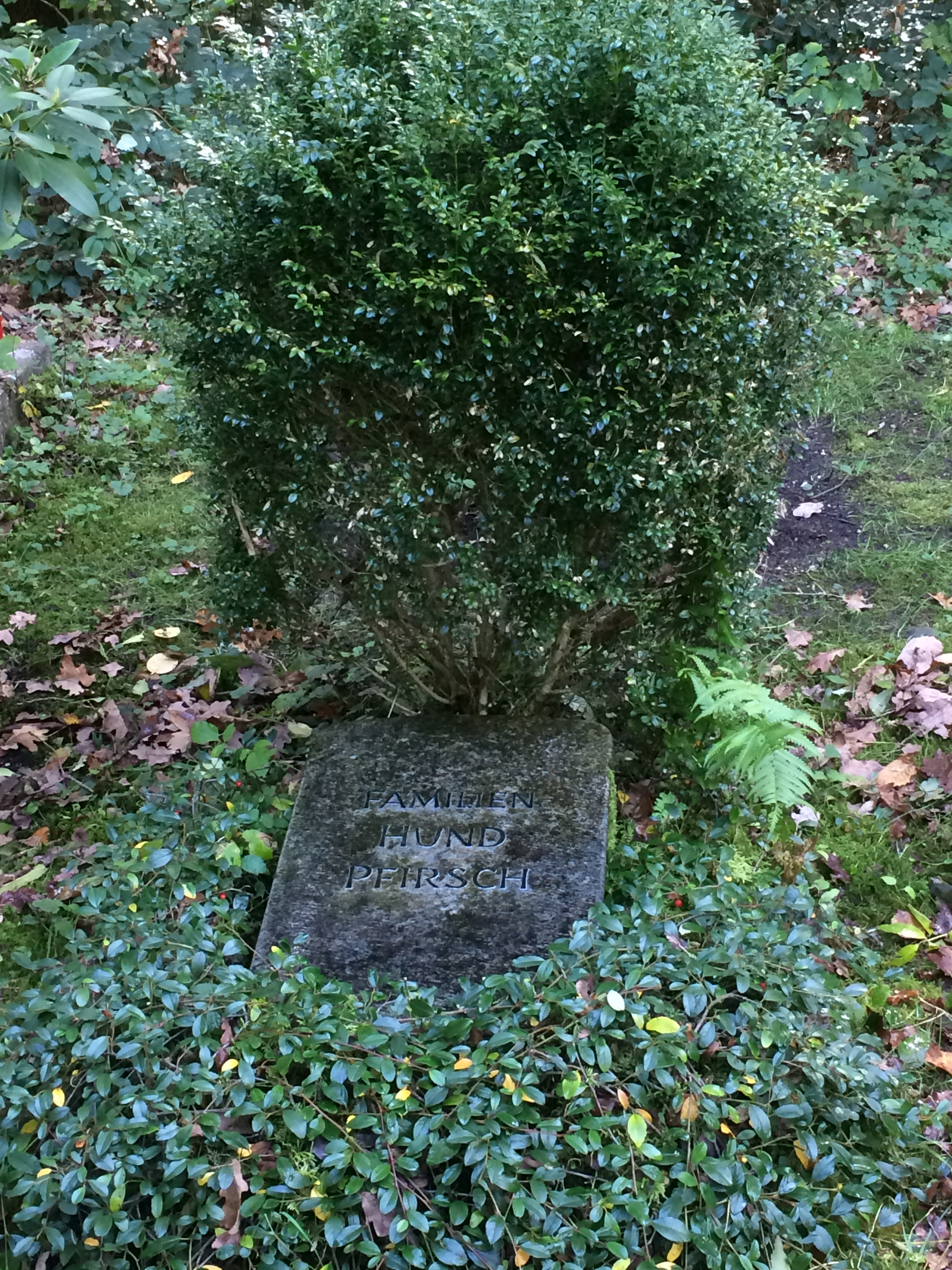 Grabstein der Familien Hund & Pfirsch in München. Im Grab liegen Prof. Dr. Friedrich Hund, seine Ehefrau Dr. Ingeborg Seynsche, seine Schwester Gertrud Hund, sowie sein Schwiegersohn Prof. Dr. Dieter Pfirsch. Die Grabstelle liegt im Waldfriedhof Neuer Teil in München, Gräberfeld 455-43-541.